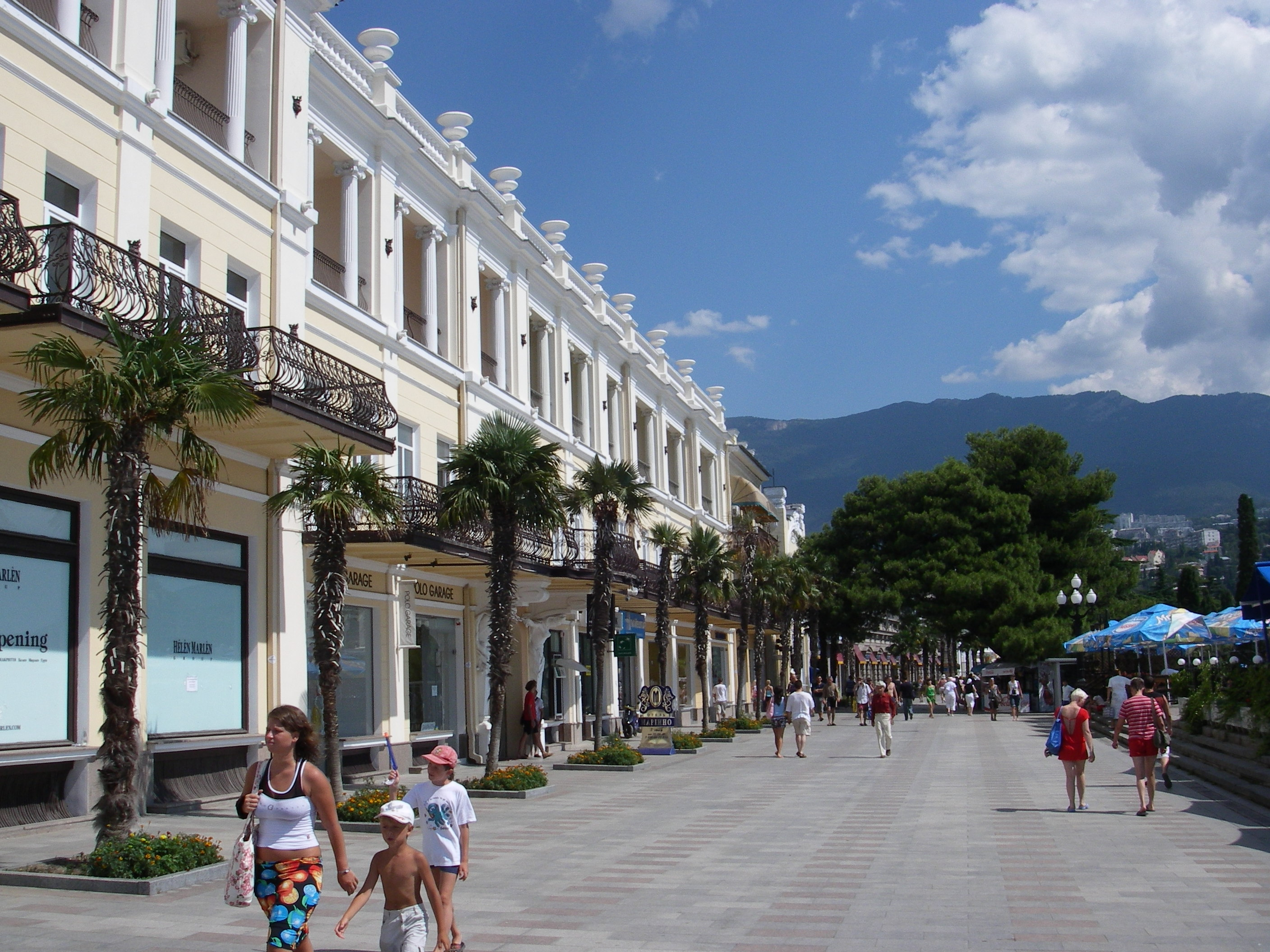 Yalta Crimea